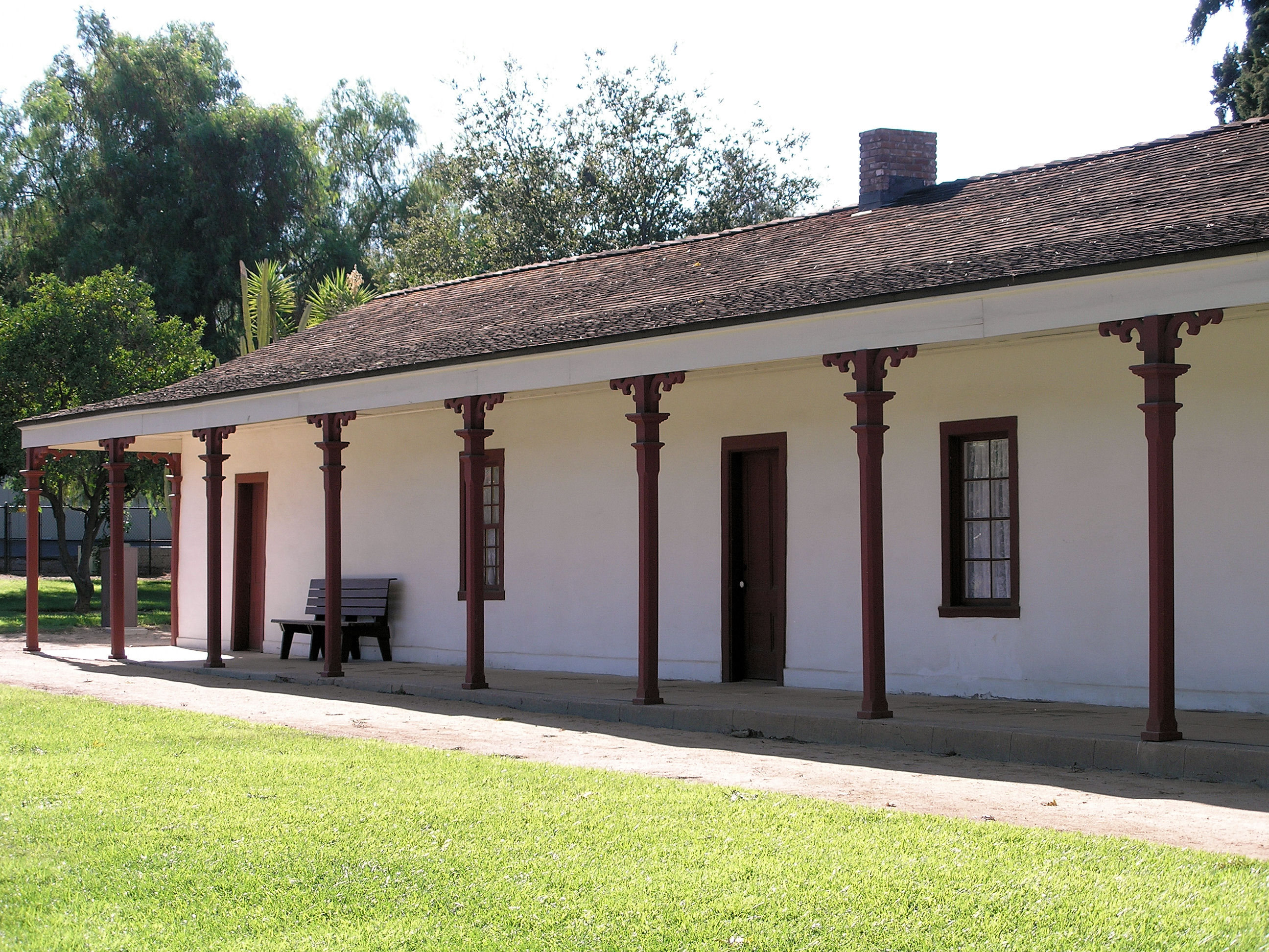 De la Osa adobe at Los Encinos State Historic Park at the Rancho Los Encinos, Encino, Los Angeles, California